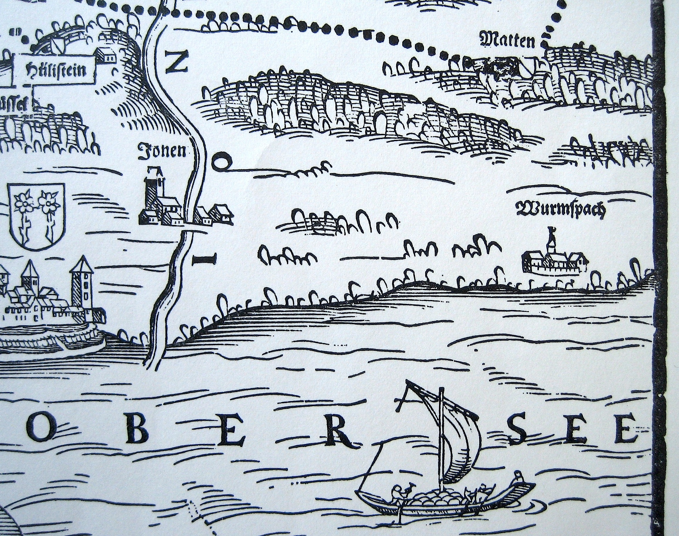 Kloster Wurmsbach auf dem Murerplan von Jos Murer von 1566